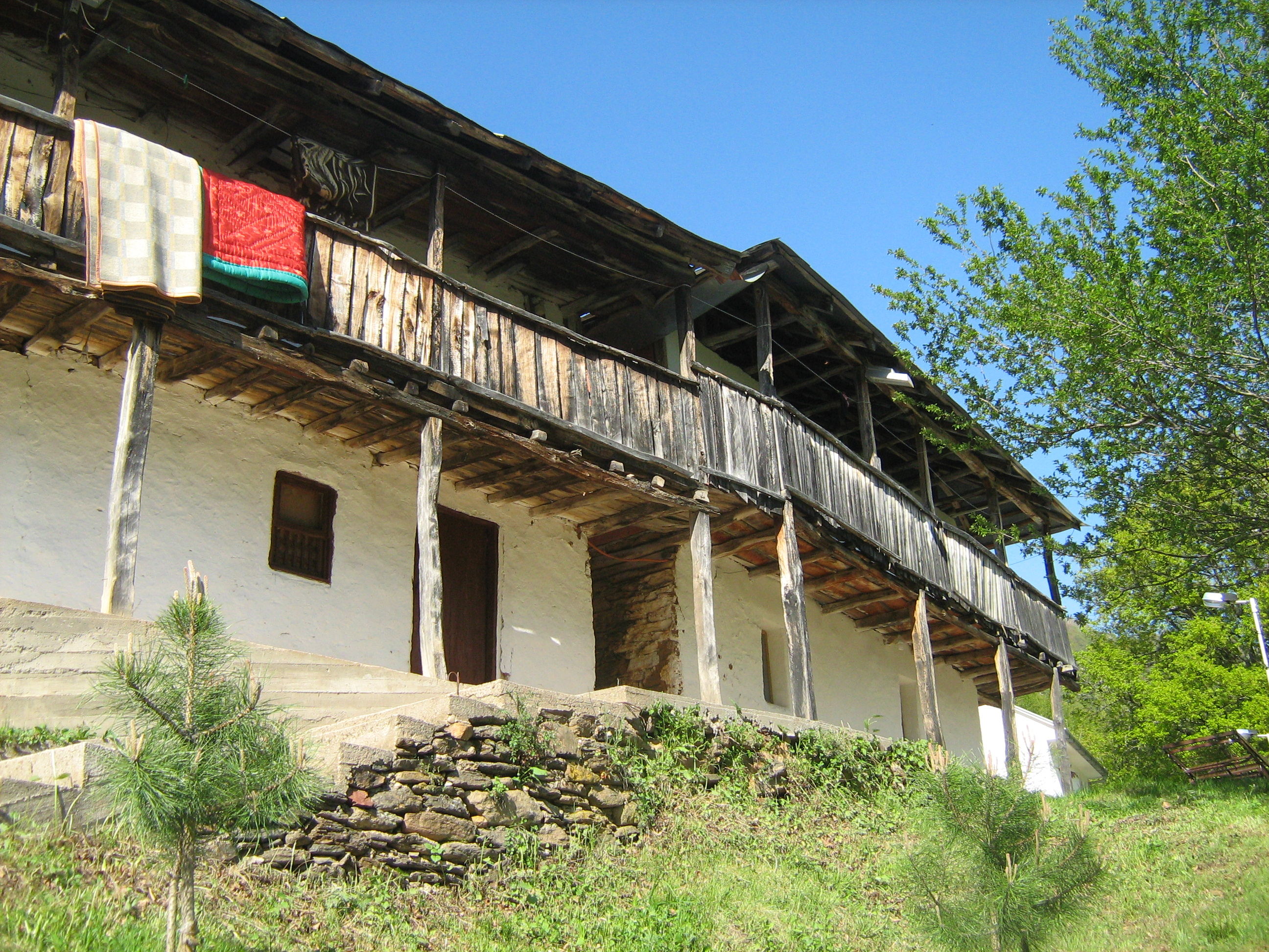 Конаците на манастирот Св. Ѓорѓија близу селото Ореше, Азот, Република Македонија